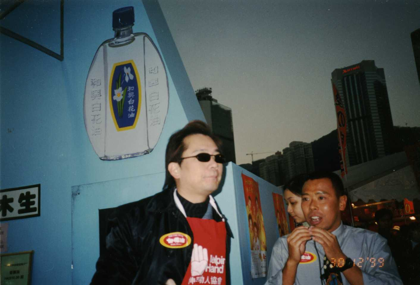 這張照片是蔡楓華於1999年12月30日於工展會出席一個商品宣傳活動時所攝得，在右邊作講解者是顏福偉。